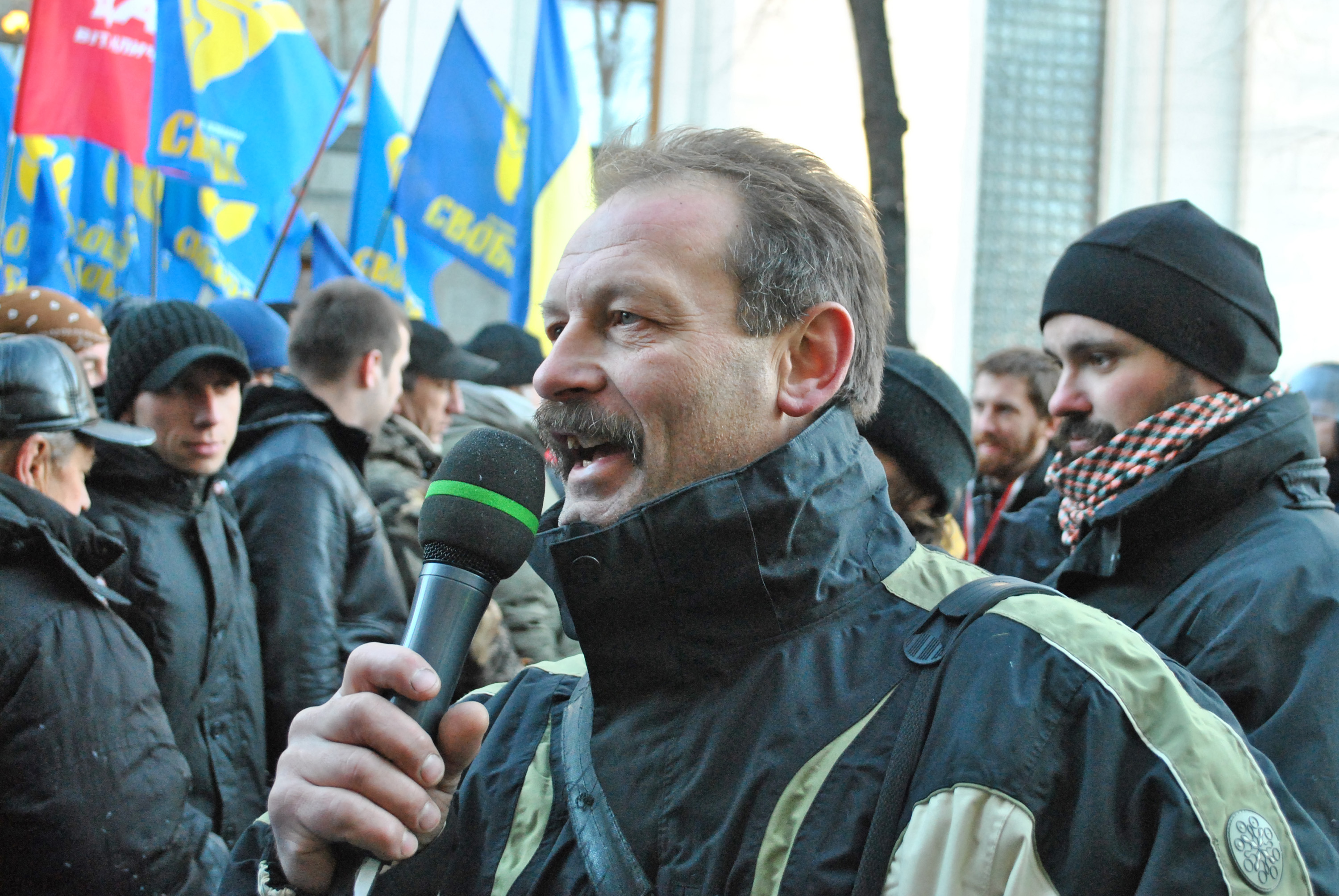 Український громадсько-політичний діяч, народний депутат України 8-го скликання, уродженець с. Нагірянка Чортківського району Олег Степанович Барна. Виступ біля Верховної Ради 3 грудня 2013 року під час Євромайдану.